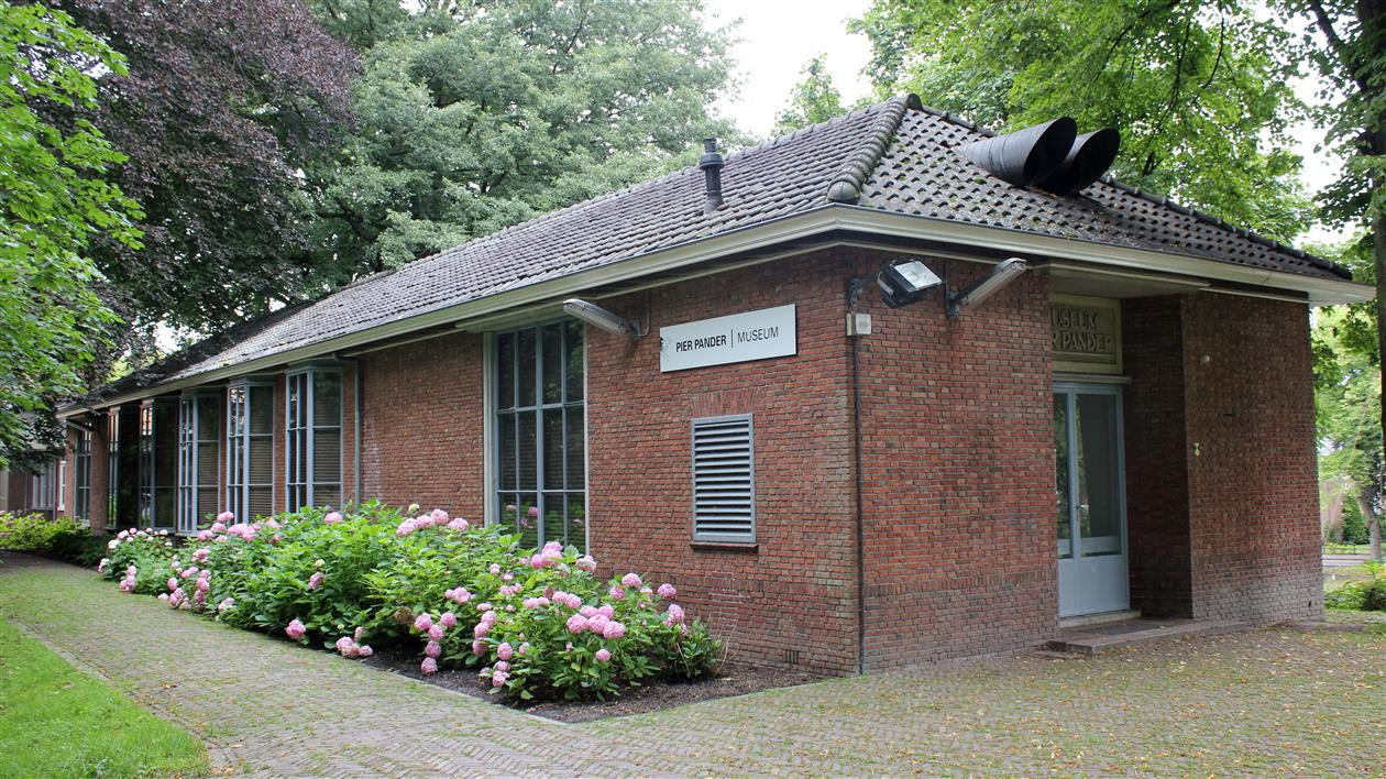 Pier Pander museum in de Prinsentuin te Leeuwarden